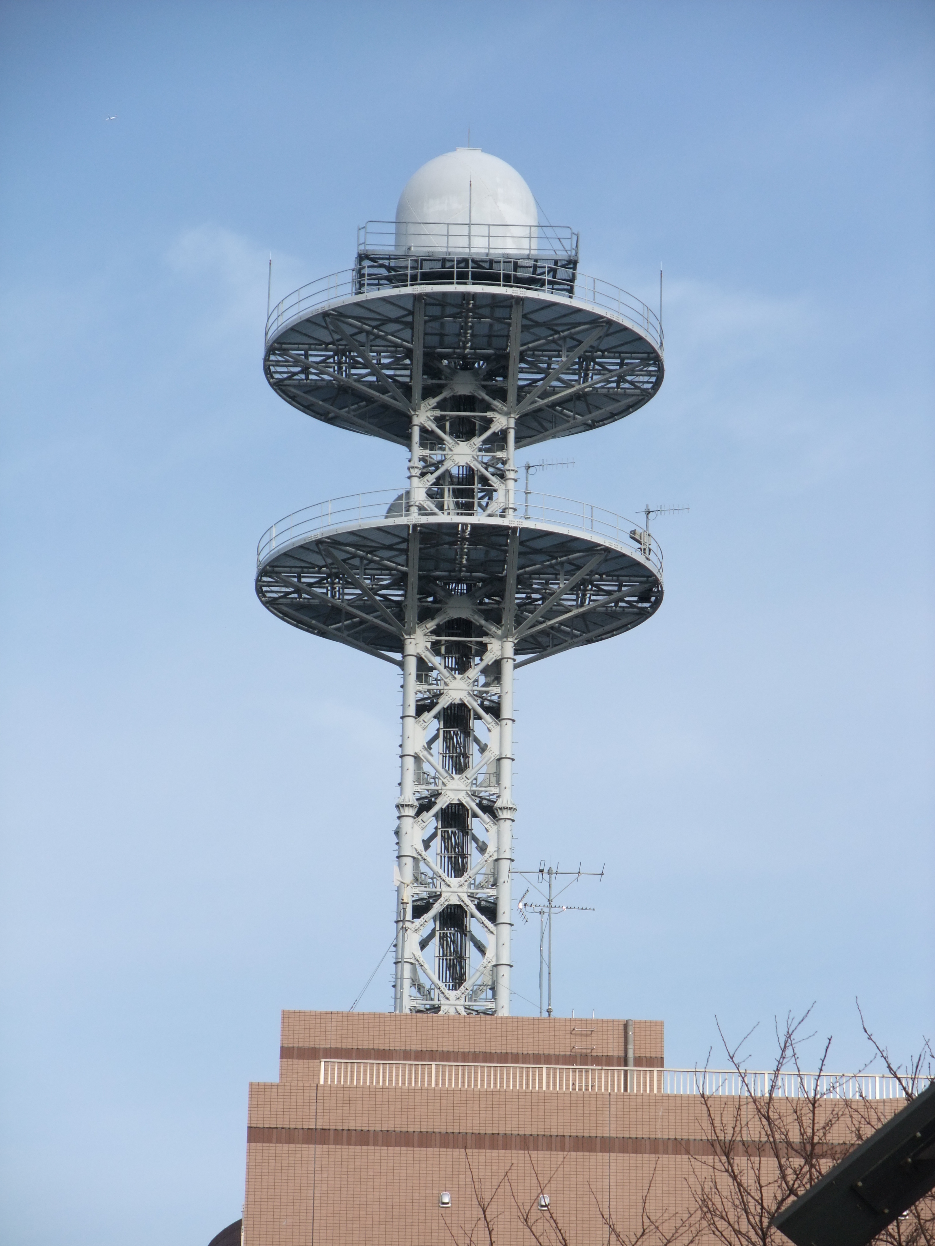 日産スタジアムがある新横浜公園の一角、鶴見川多目的遊水地（国土交通省所管）の京浜河川事務所脇に建つXバンドMPレーダーのタワー。ここで得られた気象観測情報は、ほど近い東海道新幹線新横浜駅にも届けられ豪雨時の運行判断にも用いられている。 Fujifilm FinePix F100fd